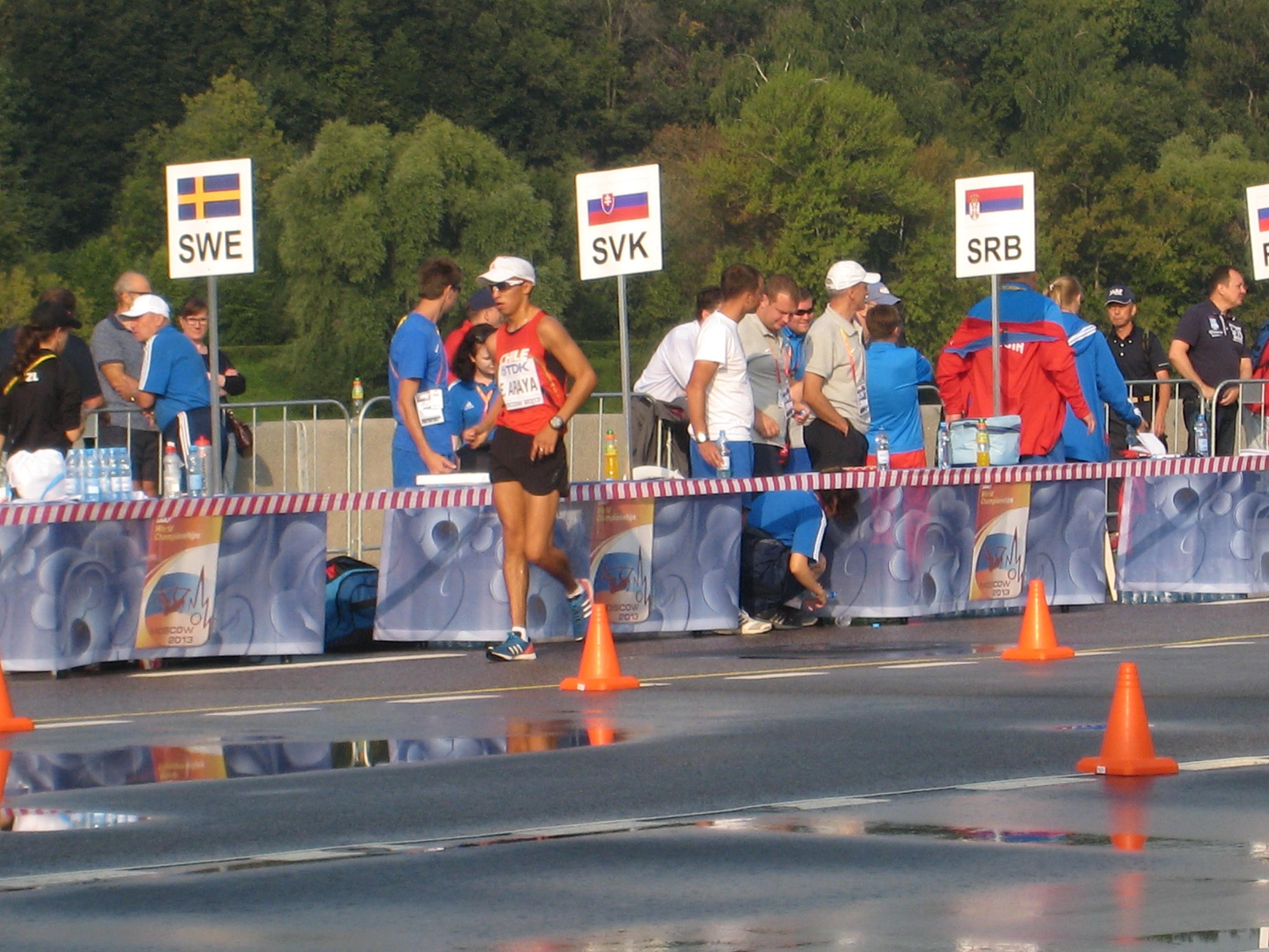 Чемпионат мира по лёгкой атлетике 2013. Ходьба 50 км, мужчины. Чилийский ходок Эдвард Арайя